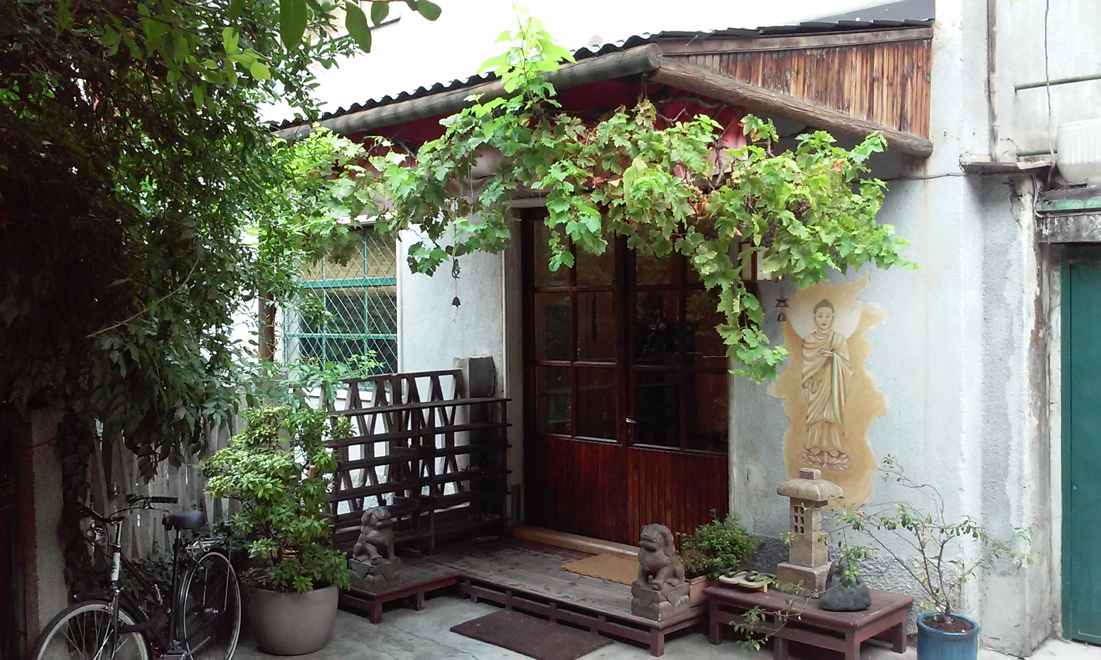 Ingresso del monastero Ensoji